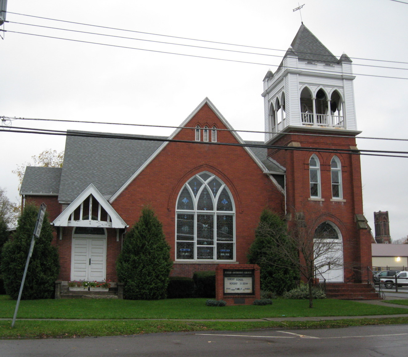 Dundee, New York